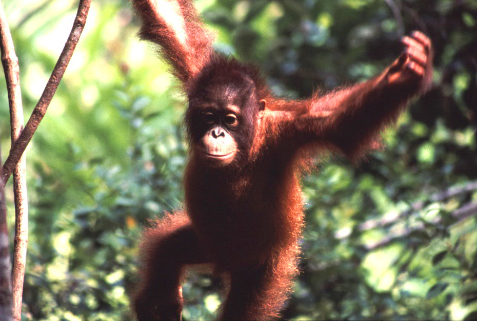 Orangutan (Pongo pygmaeus) in a rescue center in central Borneo